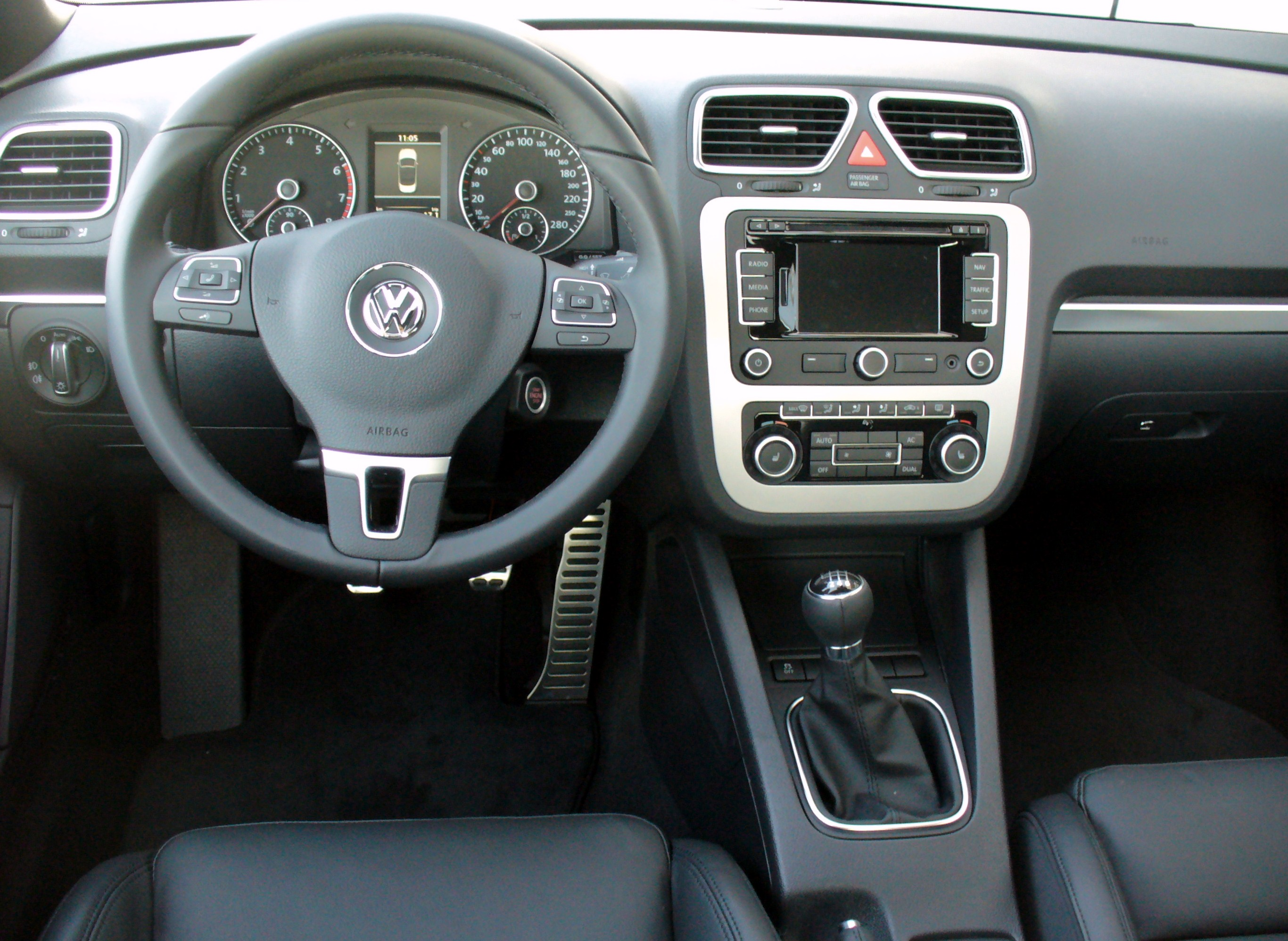 VW Eos Facelift